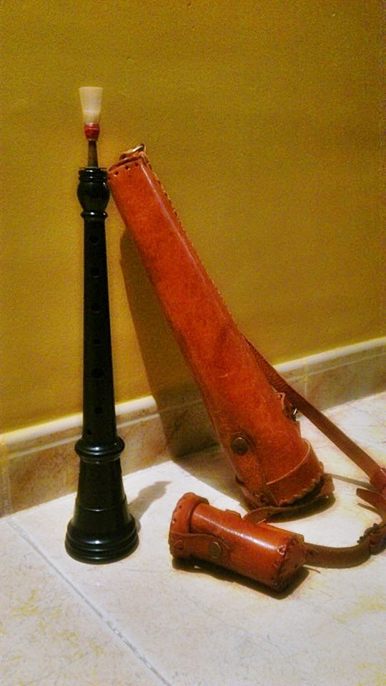 Una dulzaina con su funda de cuero.